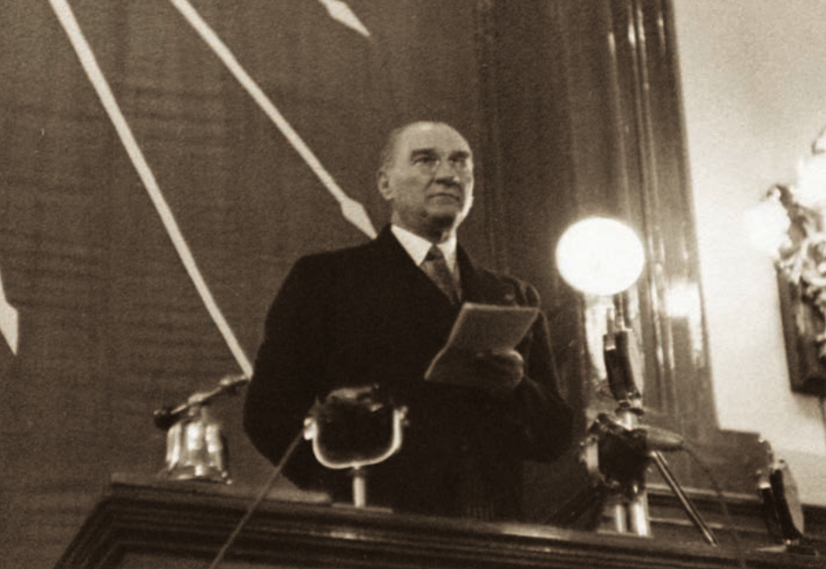 Atatürk CHP'nin 4. Kurultay'ında, Ankara, 9 Mayıs 1935